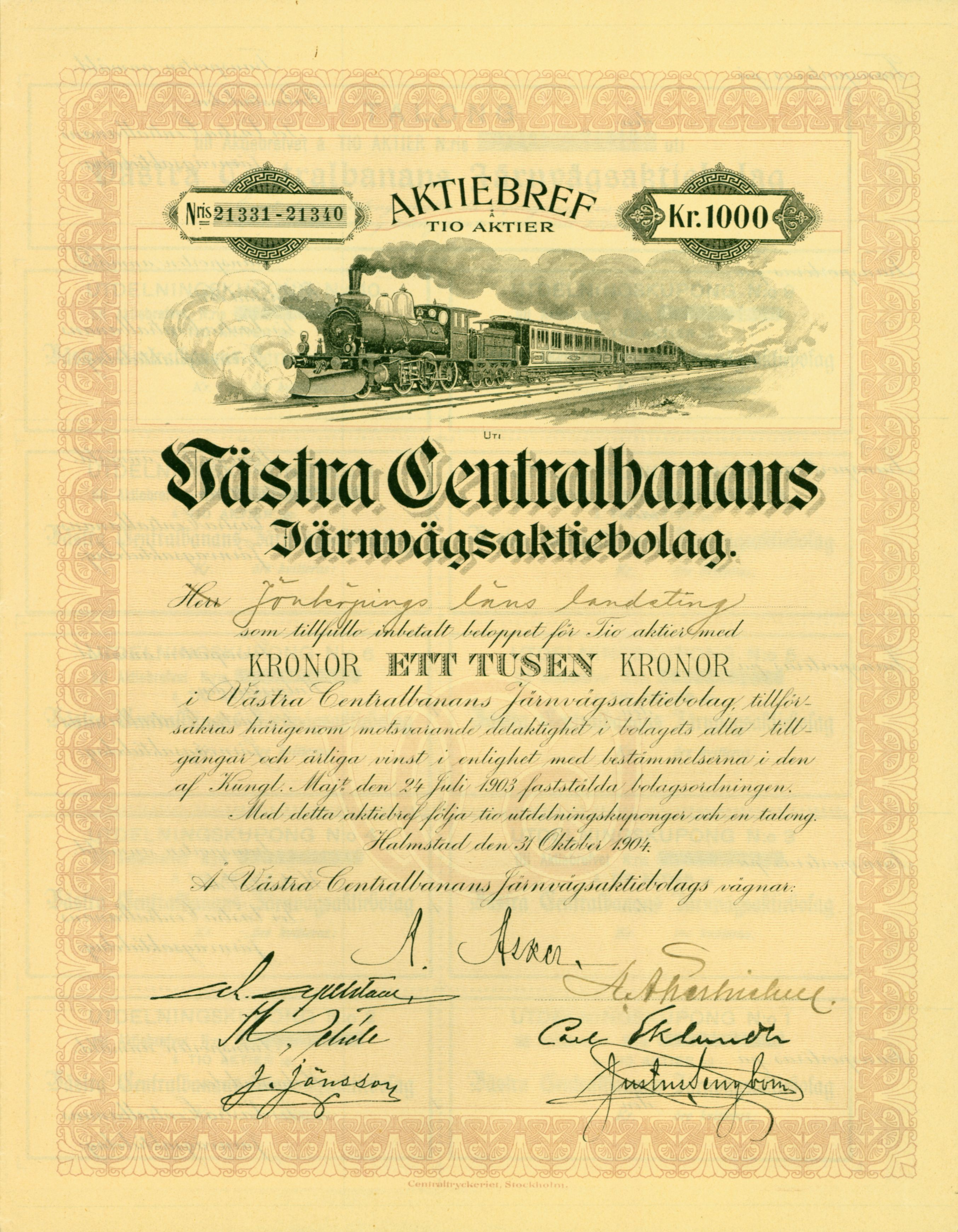 Aktie über 1000 Kronen der Västra Centralbanans Järnvägsaktiebolag vom 31. Oktober 1904; aus dem Fundus des Ersten Deutschen Historic-Actien-Museum e.V. (EDHAM), Kürnbach